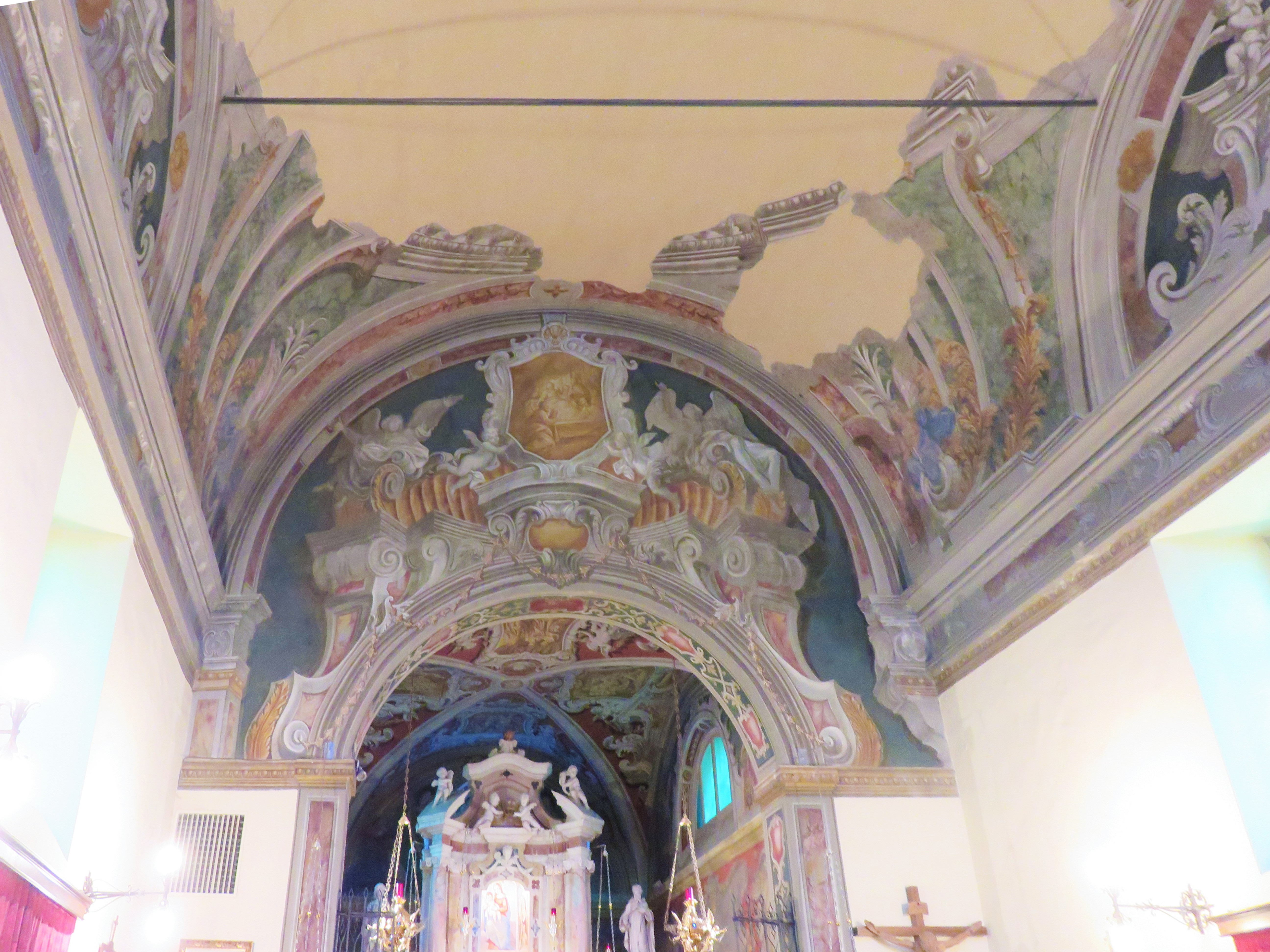 Interno del santuario della Madonna del Monte. Volta della navata. L'affresco è stato quasi completamente distrutto durante un bombardamento del 1945. La copertura della chiesa è stata ricostruita ma non è stato possibile ripristinare l'antica opera artistica, autori della quale furono, probabilmente, Fattori e Pezcoller